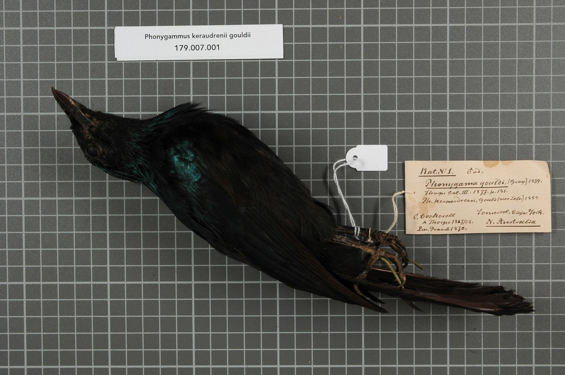 Phonygammus keraudrenii gouldii (Gray, 1859)